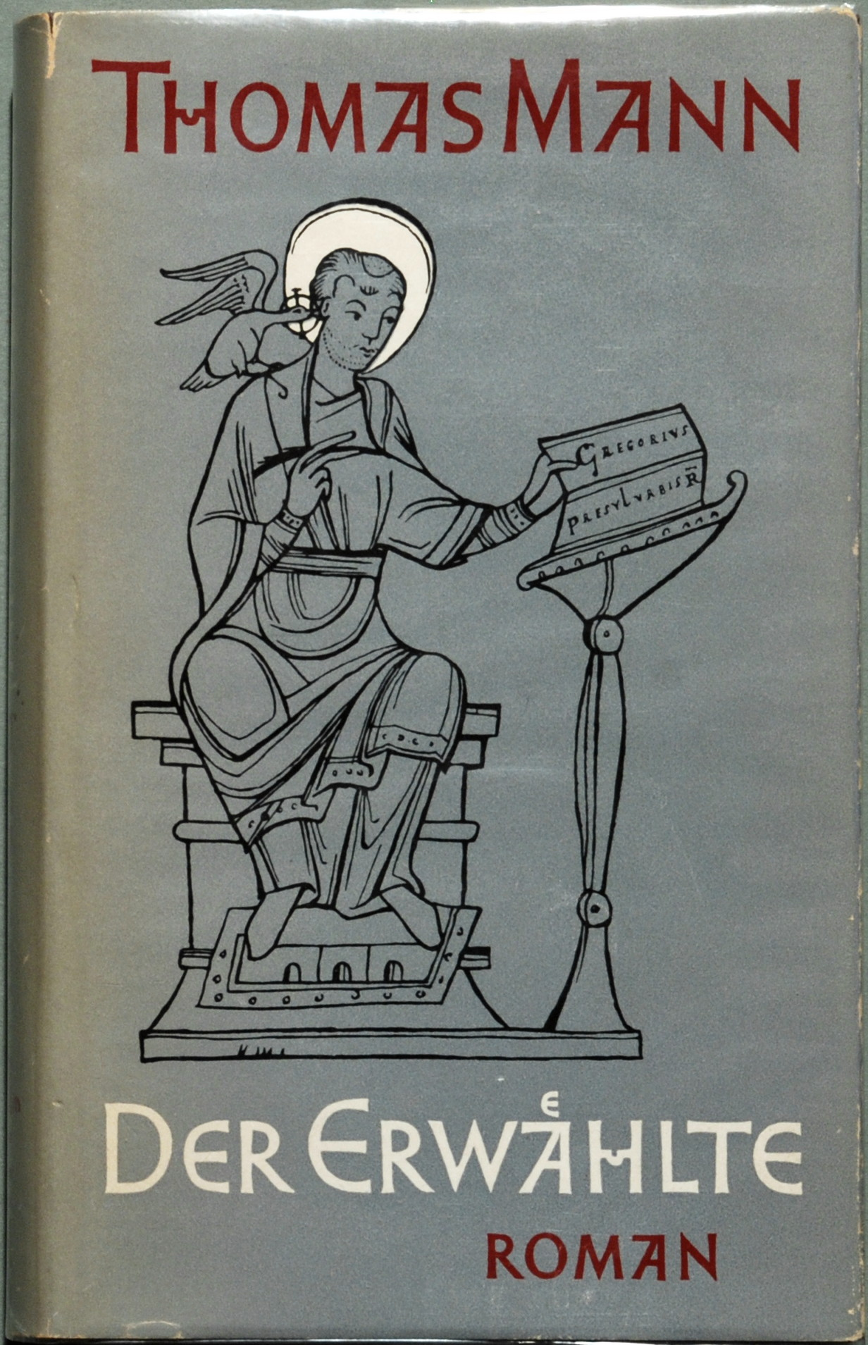 Thomas Mann: Der Erwählte. Roman. Frankfurt am Main: S. Fischer 1951, 323 Seiten. Erstausgabe in Europa (Potempa D 11.2, Bürgin I 89 A, Wilpert/Gühring² 121) Orig.-Leinen 19,2 x 12 cm, Orig.-Verlagsumschlag (in Klarsichtfolie eingelegt).